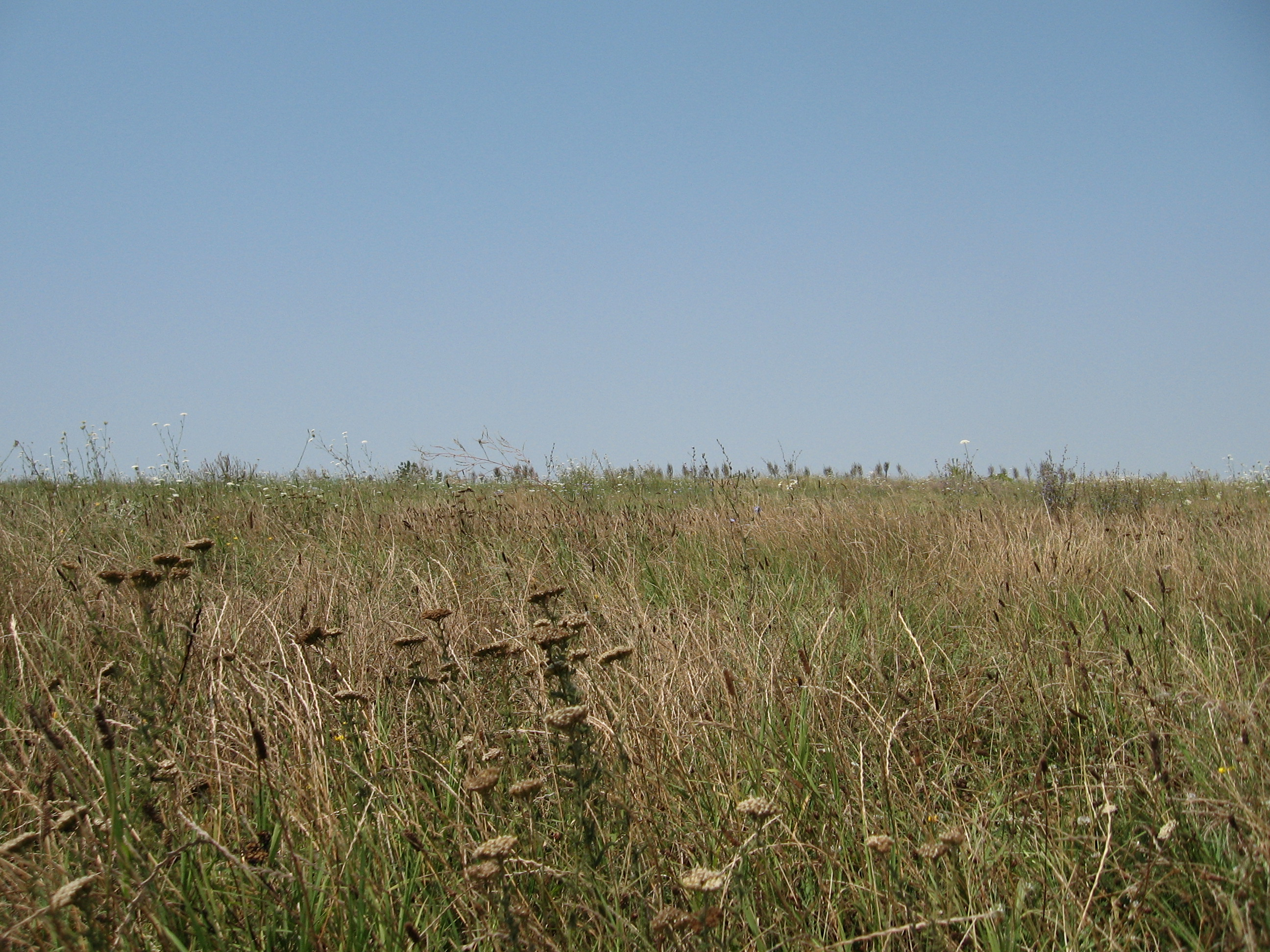 Das Bild habe ich am 29.07.2006 , 20km nord-westlich von Giurgiu in der Walachischen Tiefebene aufgenommen, an einem Ort wo die natürliche Steppenvegetation noch reichlich vorhanden ist.